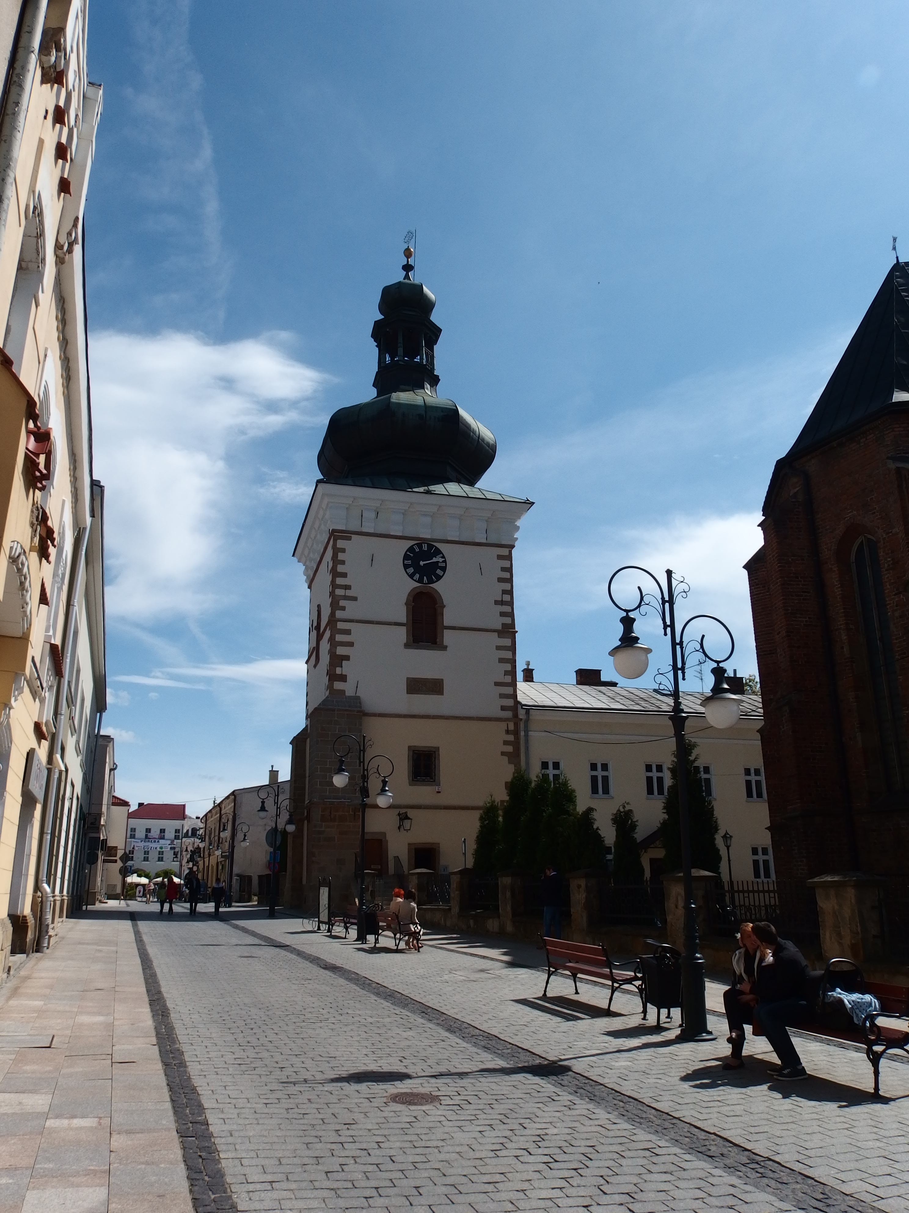 Krosno, dzwonnica, 1 poł. XVII